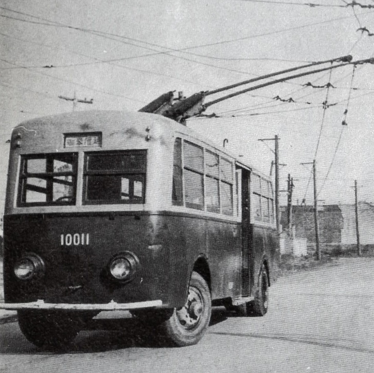 名古屋市電気局トロリーバス